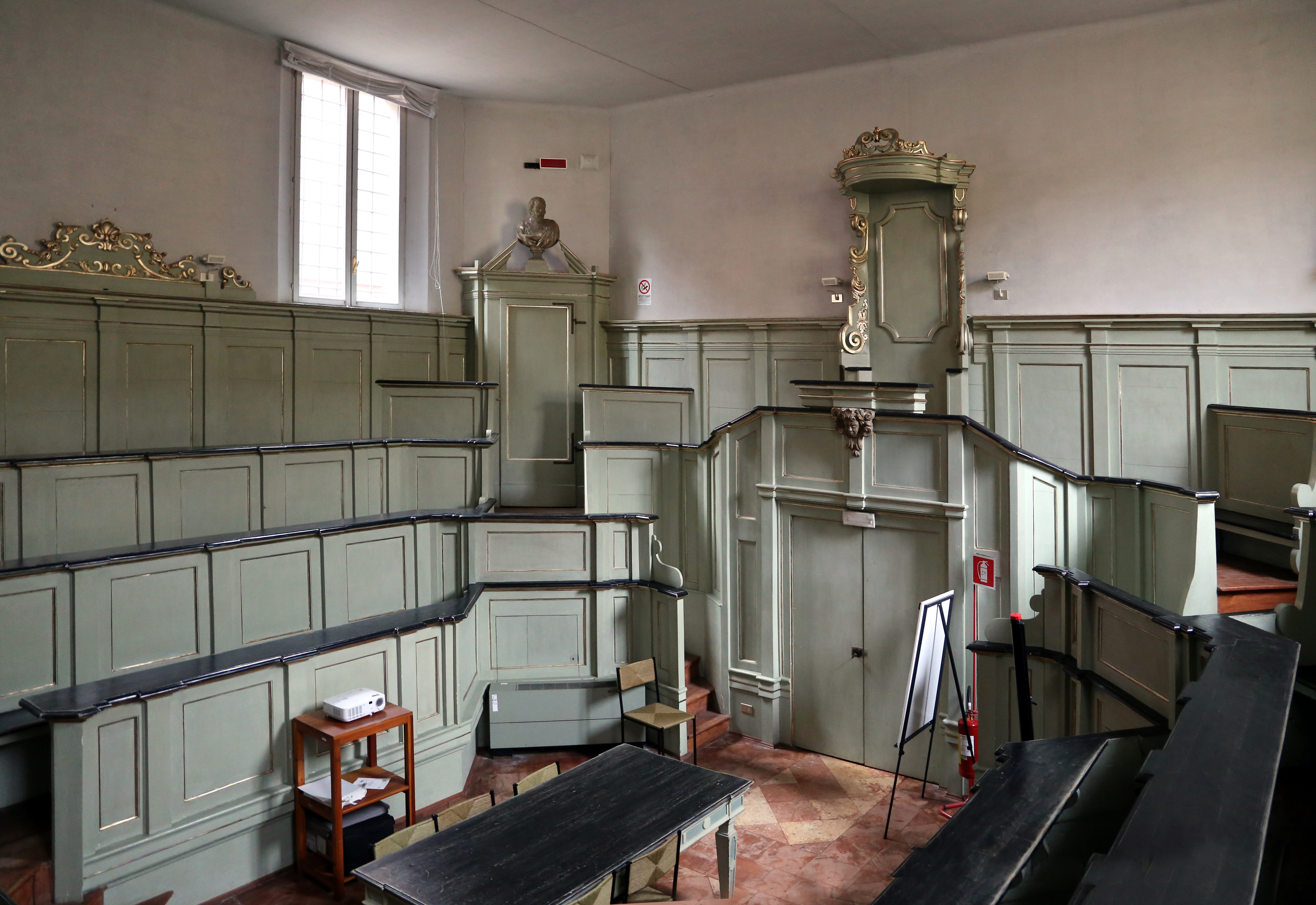 Palazzo Paradiso This is a photo of a monument which is part of cultural heritage of Italy.